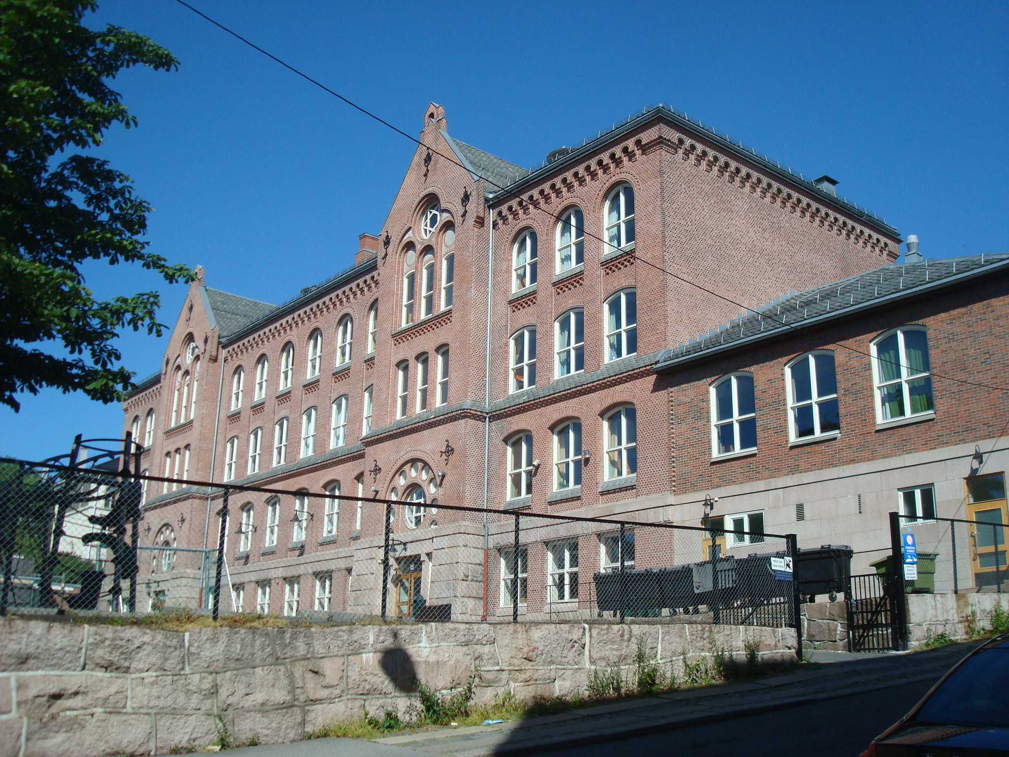 Bolteløkka skole i Oslo